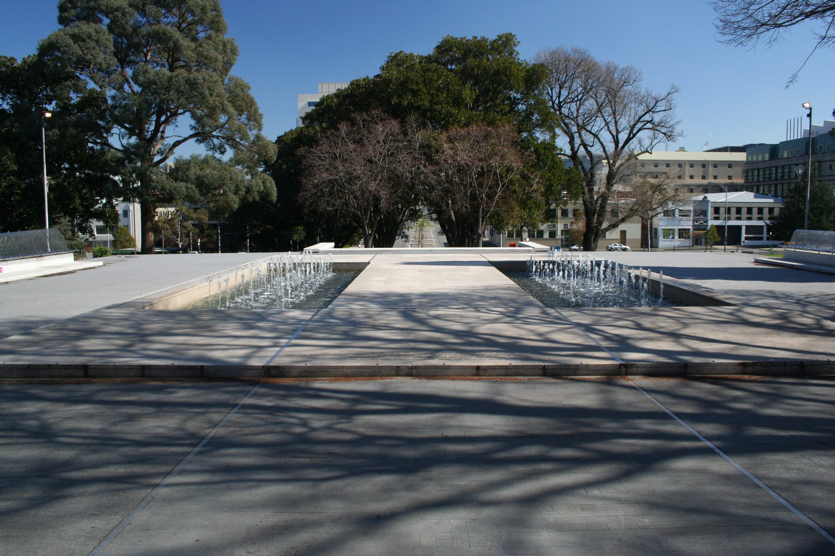 Bali Memorial, Carlton, Victoria, Australia